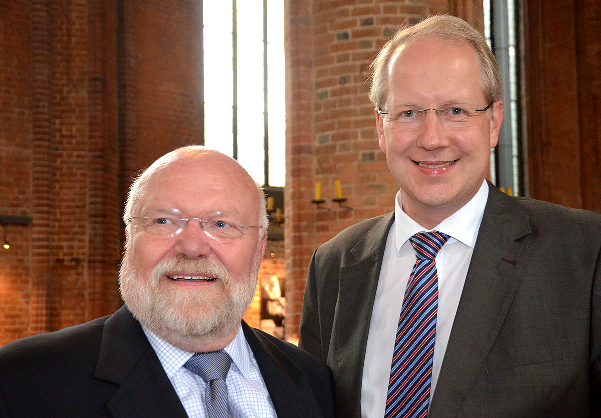 Stefan Schostok (rechts), Oberbürgermeister der Landeshauptstadt Hannover, hier in der Marktkirche während der Feierlichkeiten zur Verabschiedung des Vorstandsvorsitzenden des Sozialkaufhauses „fairKauf“, Reinhold Fahlbusch (links) ...